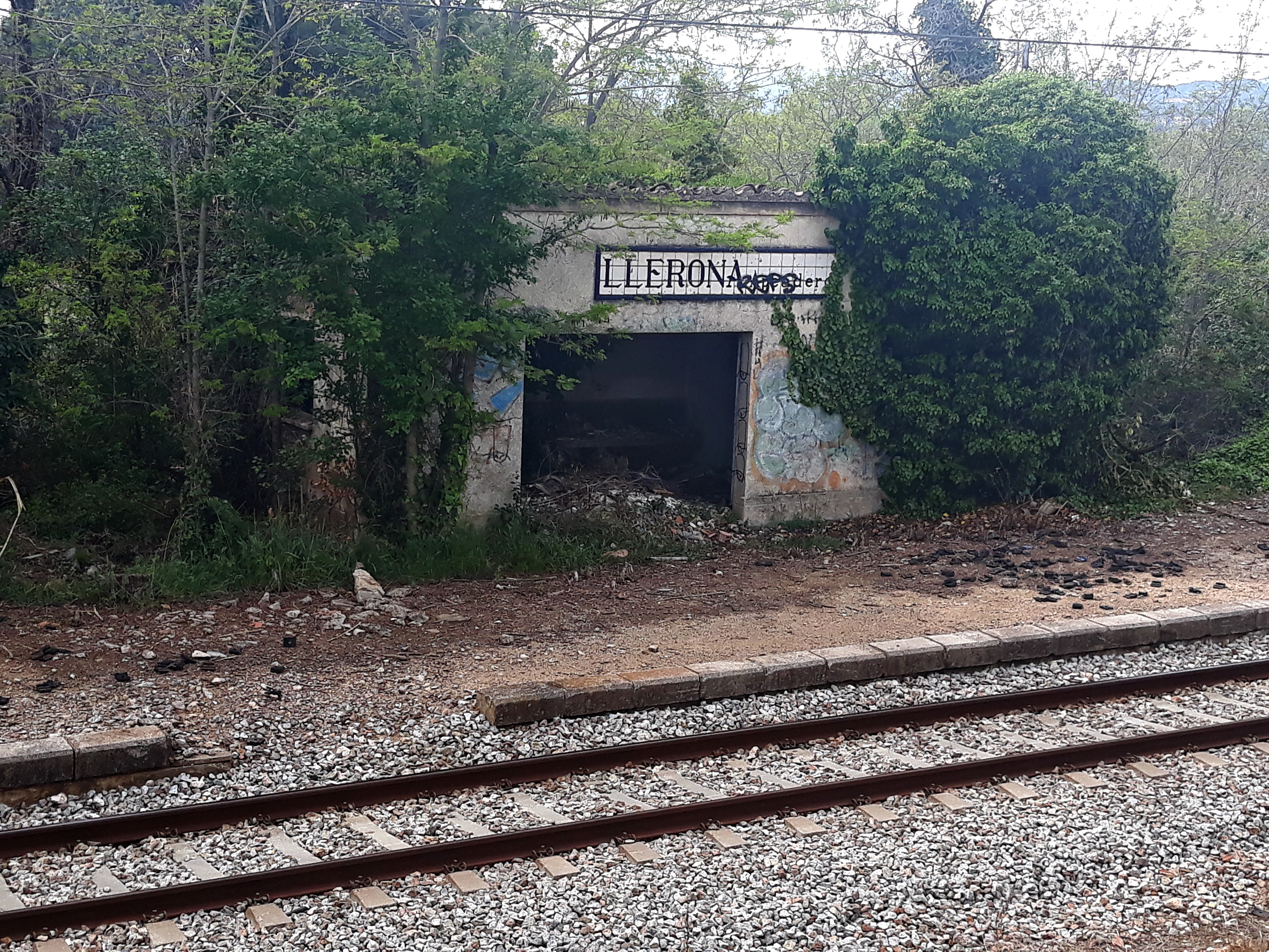 Baixador de Llerona a la línia R3 de Rodalies. Inoperativa des de 1993